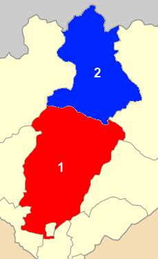 Χάρτης των ενοτήτων (και πρώην δήμων) από τις οποίες αποτελείται ο Δήμος Δράμας. Δράμας Σιδηρόνερου